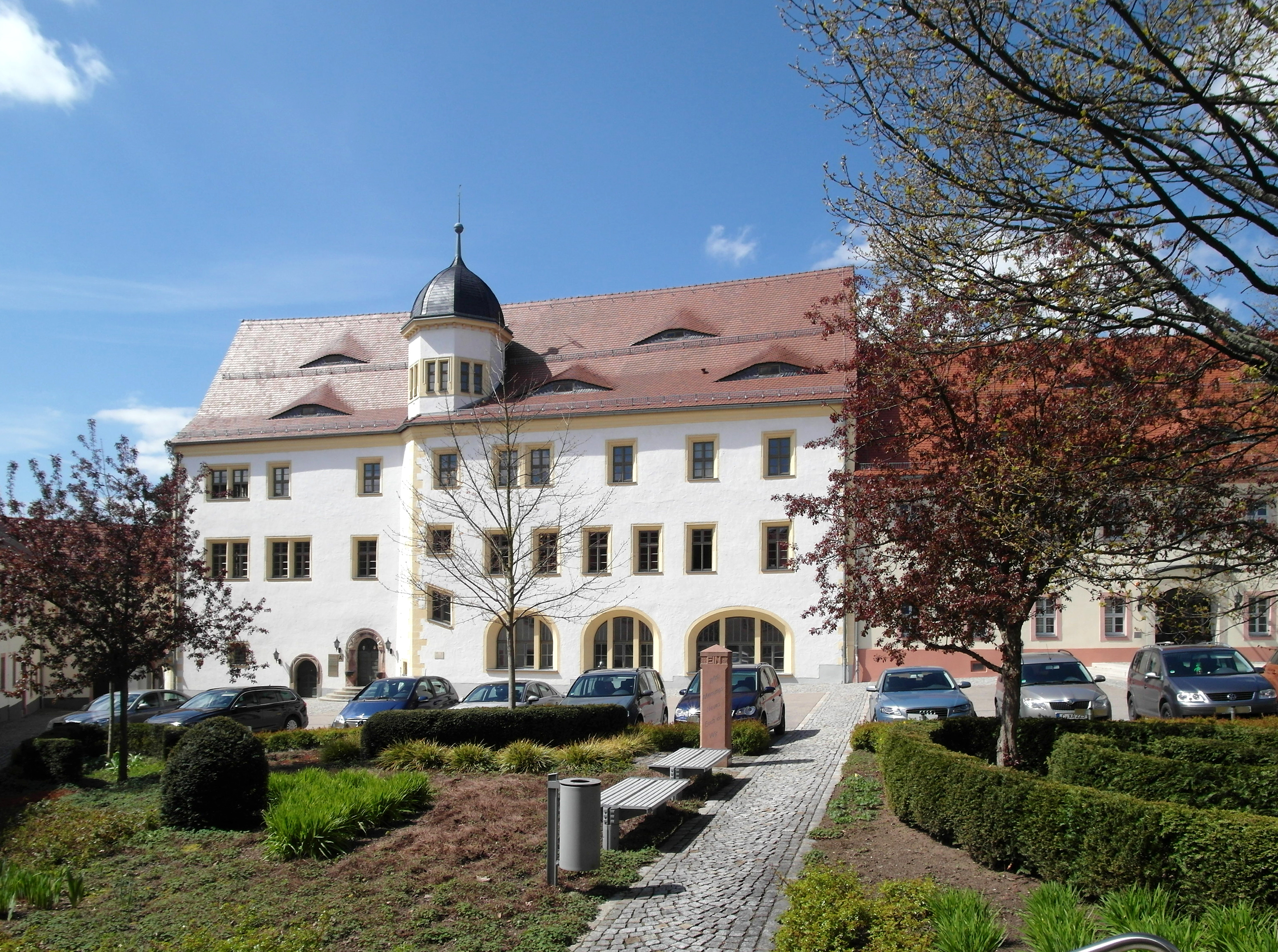 24.04.2017 09212 Limbach (Limbach-Oberfrohna), Rathausplatz 1: Rittergut Limbach, Herrenhaus (GMP: 50.858056,12.767706). Auf dem Gelände des aus dem 13. Jh. stammenden Ritterguts ließ Georg I. von Schönberg um 1570 das heutige Herrenhaus im schlichten Renaissancestil errichten. Heute Sitz der Stadtverwaltung. Sicht aus dem Hof von Osten. [SAM9422.JPG]20170424105DR.JPG(c)Blobelt